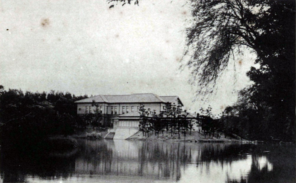 中文（台灣）: 新竹市的新竹公園，圖中建築為新竹公園湖畔料亭